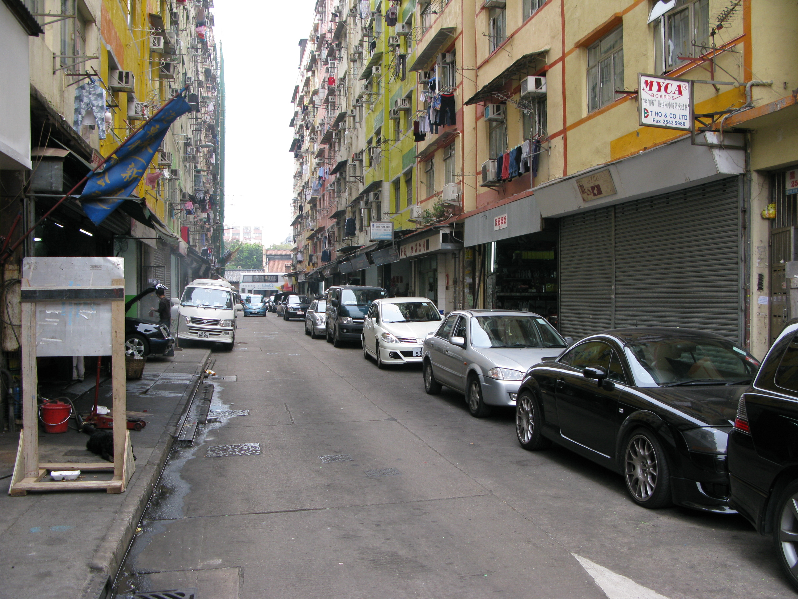 中文（香港）: 香港九龍土瓜灣十三街鷹揚街